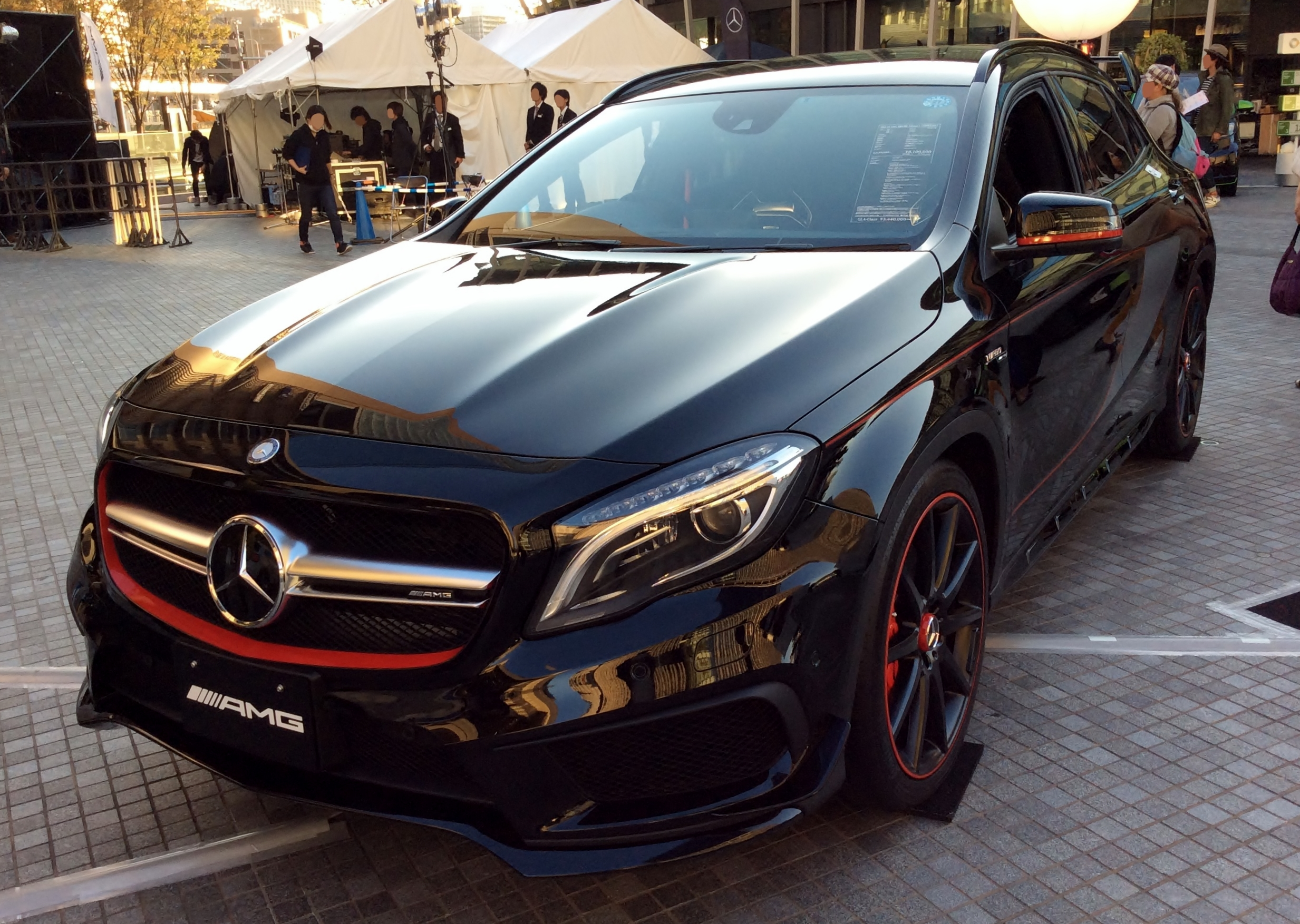 X156型メルセデス・ベンツGLA45 AMG 4マティック エディション1をフロントから撮影。